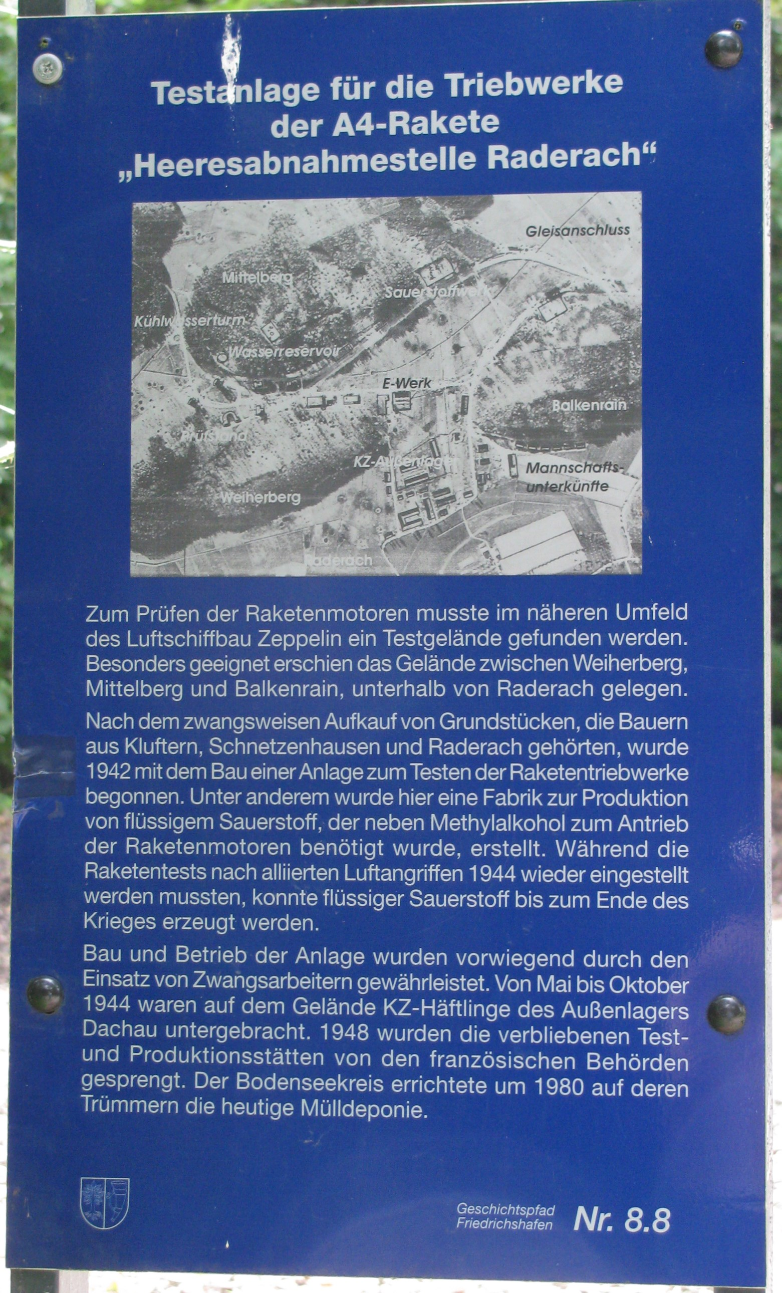 Deutschland - Baden-Württemberg - Bodenseekreis - Friedrichshafen: Geschichtspfad-Tafel 8.8 "Testanlage für die Triebwerke der A4-Rakete 'Heeresabnahmestelle Raderach'"